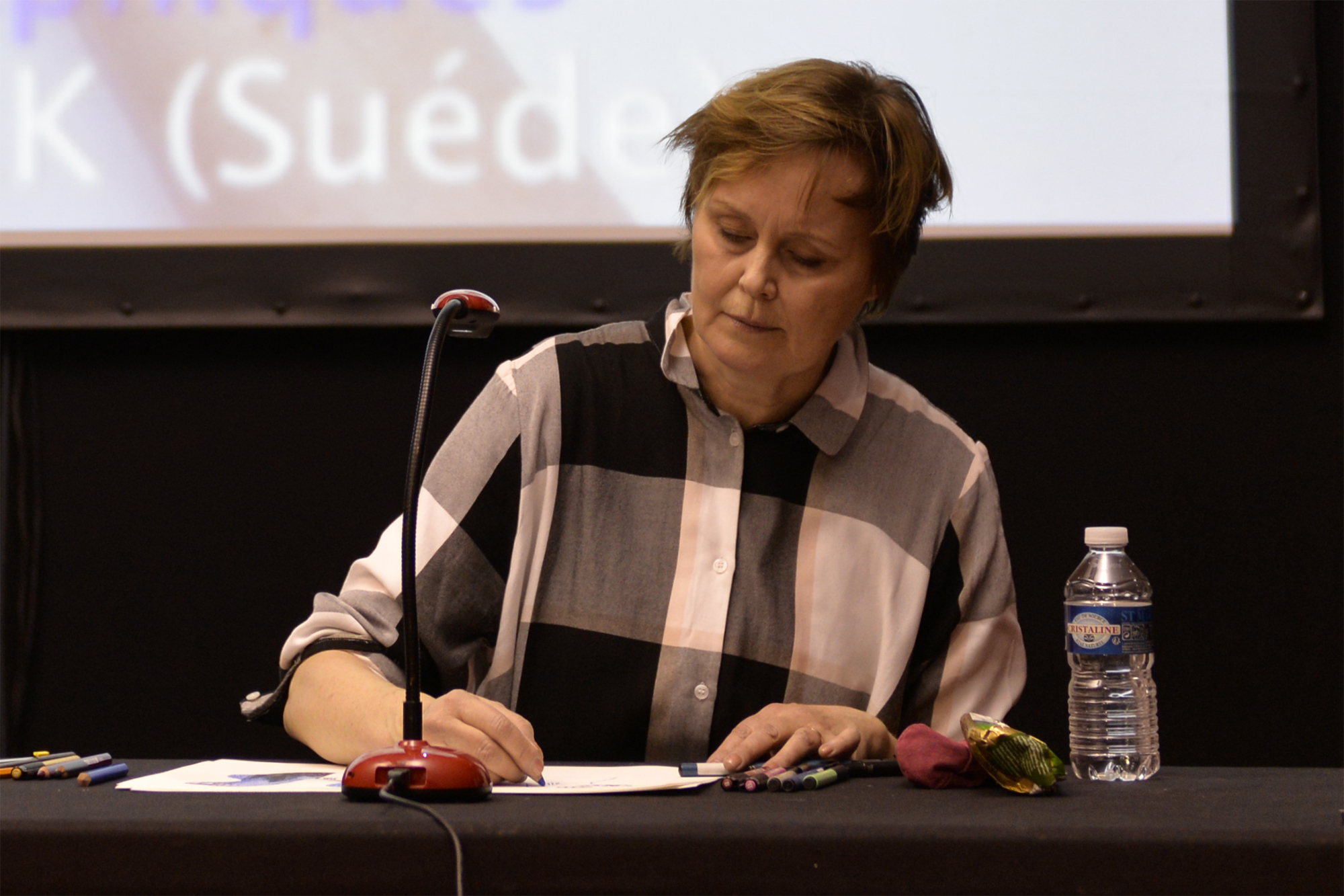 Anneli Furmark au Festival International de la Bande Dessinée d'Angoulême 2017.